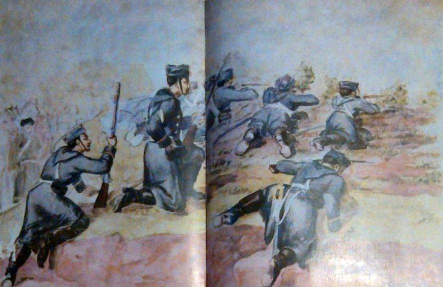 Scenă de luptă.